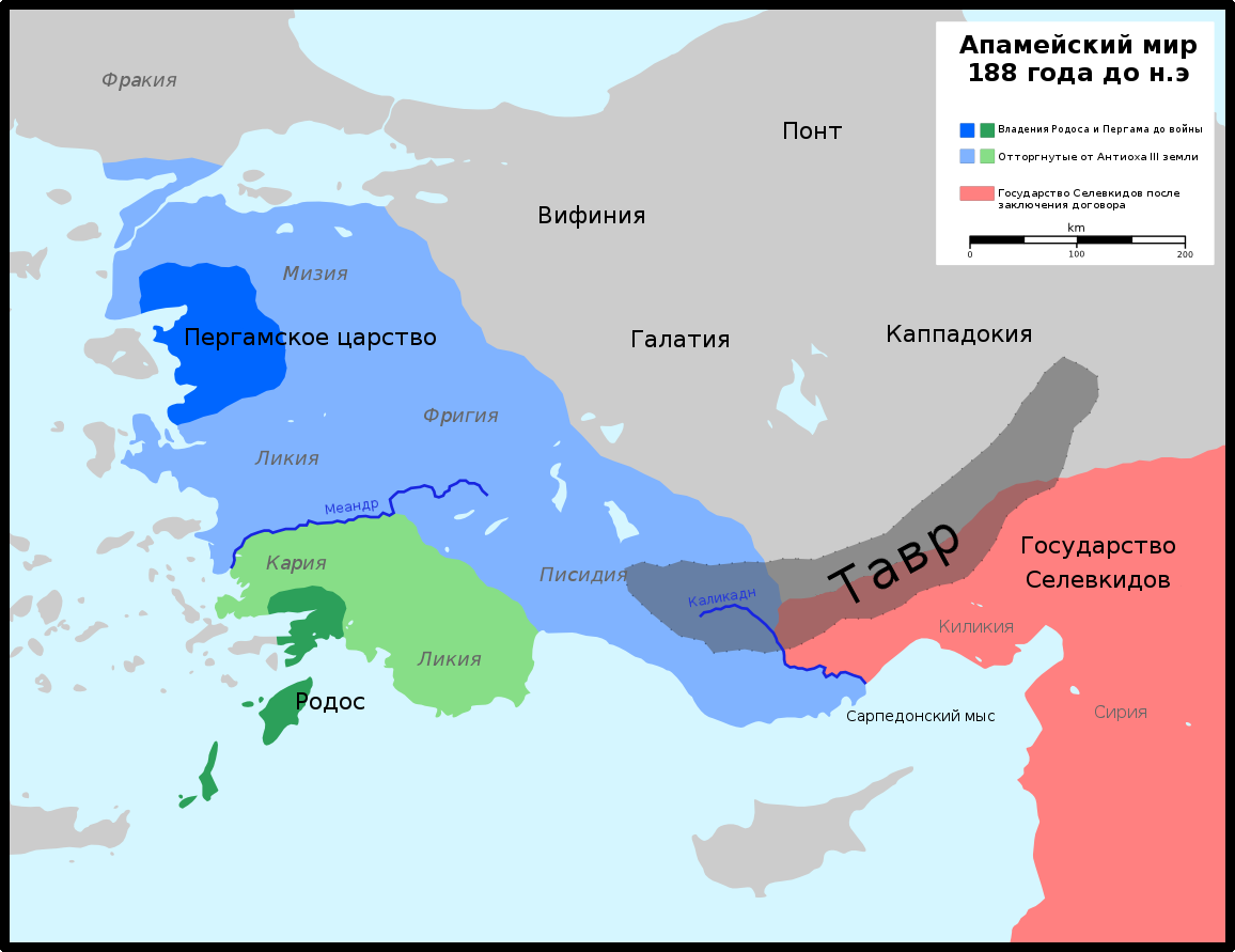 Русская версия File:Treaty of Apamea.png.